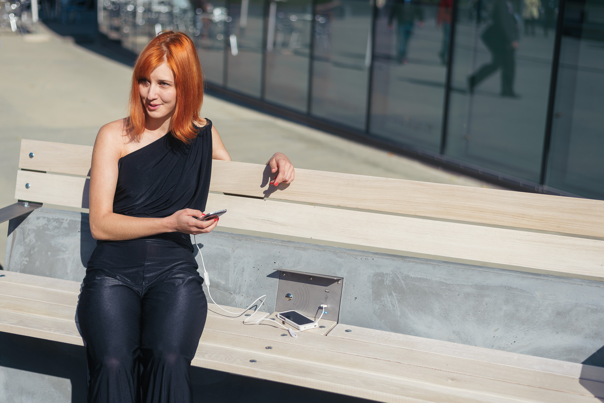 chytrá lavička dobíjí mobilní telefony